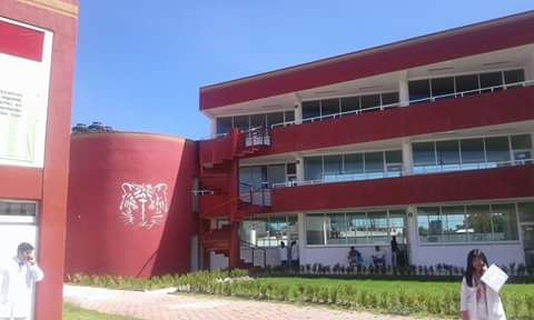 Facultad de Medicina de la UATx campus Zacatelco